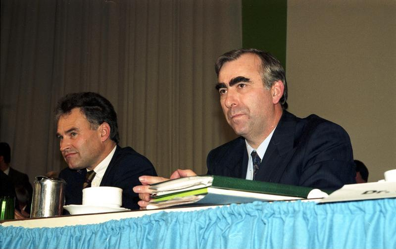 17.-18.11.1989 53. CSU-Parteitag in der Münchener Bayernhalle mit dem CSU-Vorsitzenden, Bundesminister der Finananzen, Dr. Theodor Waigel, dem Bayerischen Ministerpräsident Max Streibel, Bundesminister Hans Klein, und als Gast Bundeskanzler Helmut Kohl.